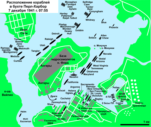 Расположение кораблей в бухте Перл-Харбор накануне японского нападения.